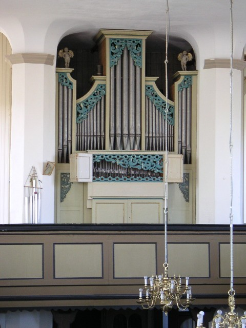 Orgel von St. Marien Himmelpforten, Landkreis Stade, Niedersachsen, Deutschland